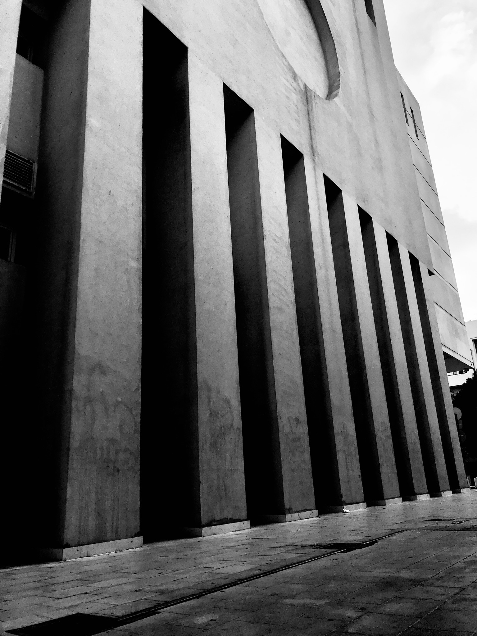 תיאטרון הבימה מזווית גן יעקוב